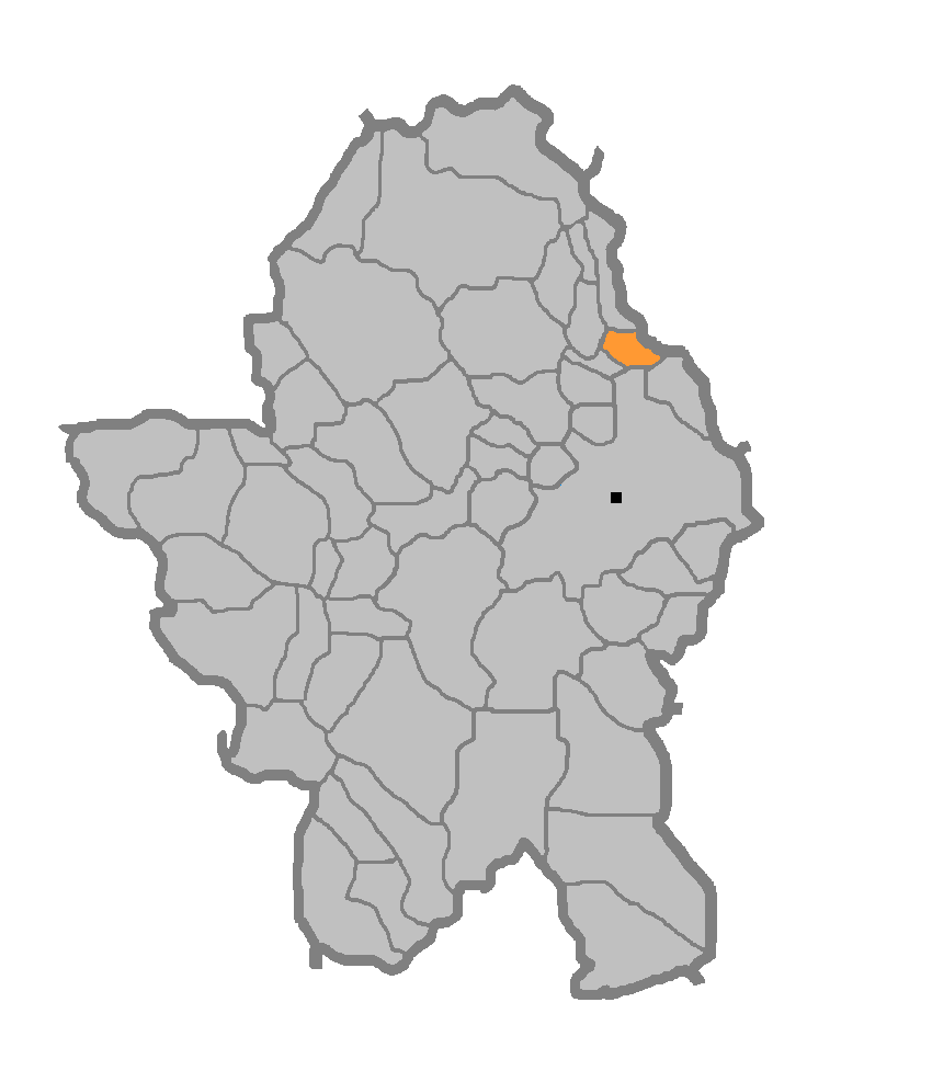 Мјесна заједница Куљани